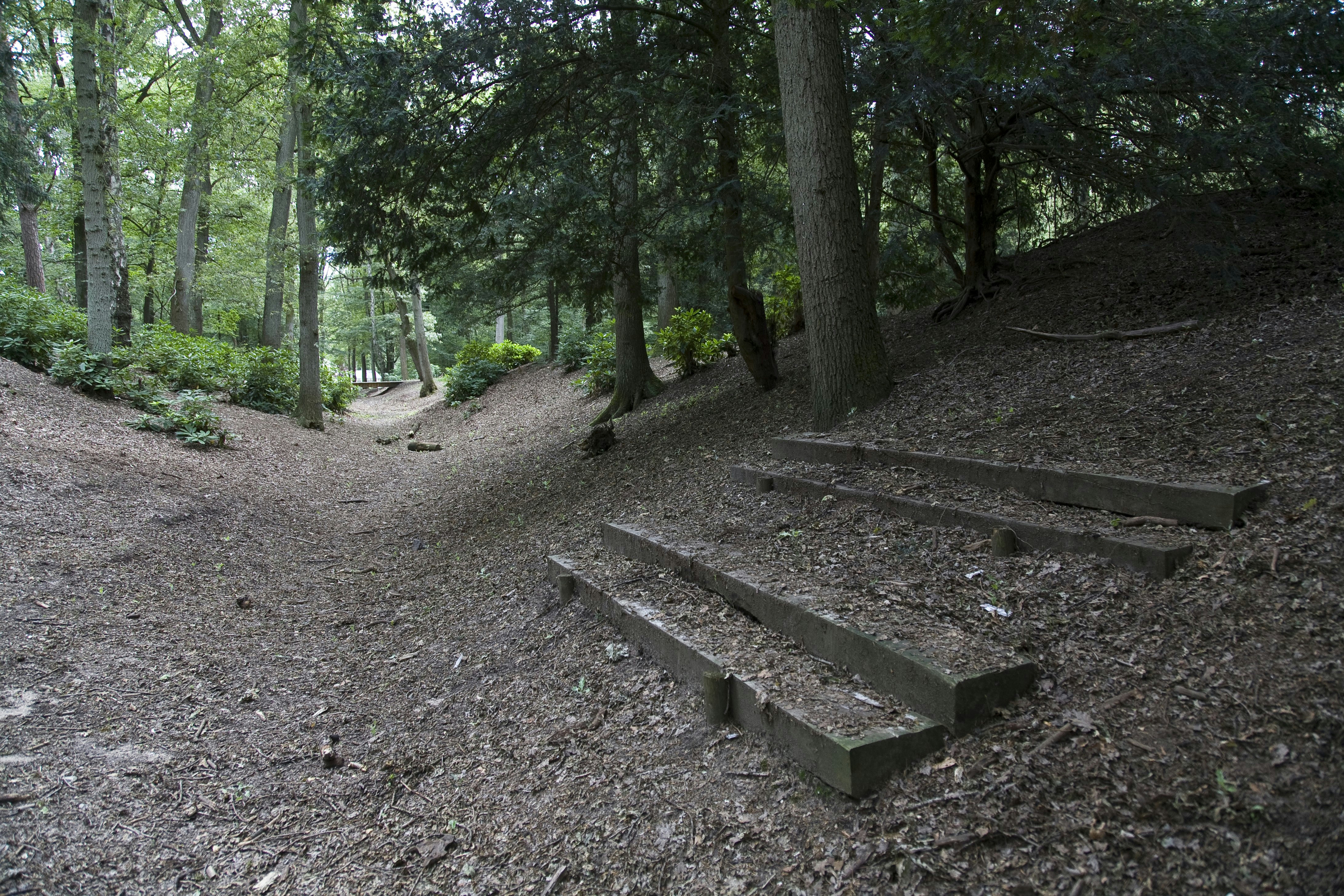 Nijmegen: Geul in het Marïenbosch bij Nijmegen, restant van Romeins aquaduct (opmerking: Publicatie TRAP route Berg en Dal)